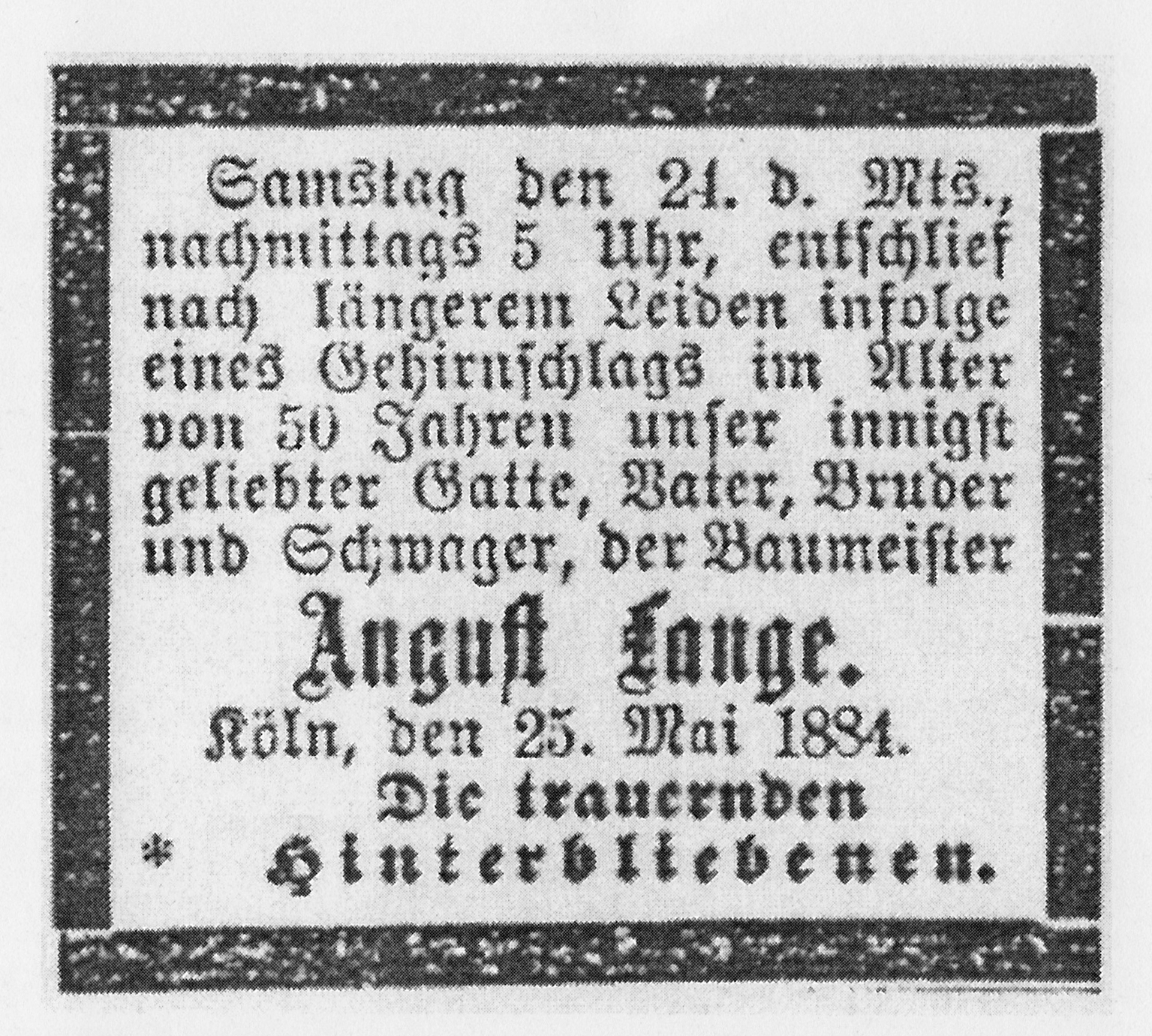 Traueranzeige August Lange (1834-1884)